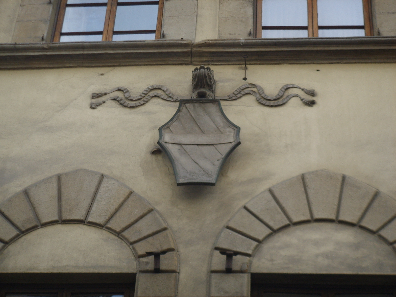 Palazzo corsini-rosselli del turco, stemma corsini